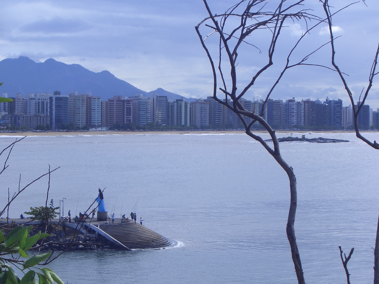 Praia de Camburi, Bairro Mata da Praia e Morro do Mestre Álvaro. Author: Junior Pedruzzi Date: 25/07/2006 Time: About 10AM